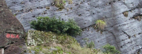 大紅袍母株，我遊歷武夷山時所攝